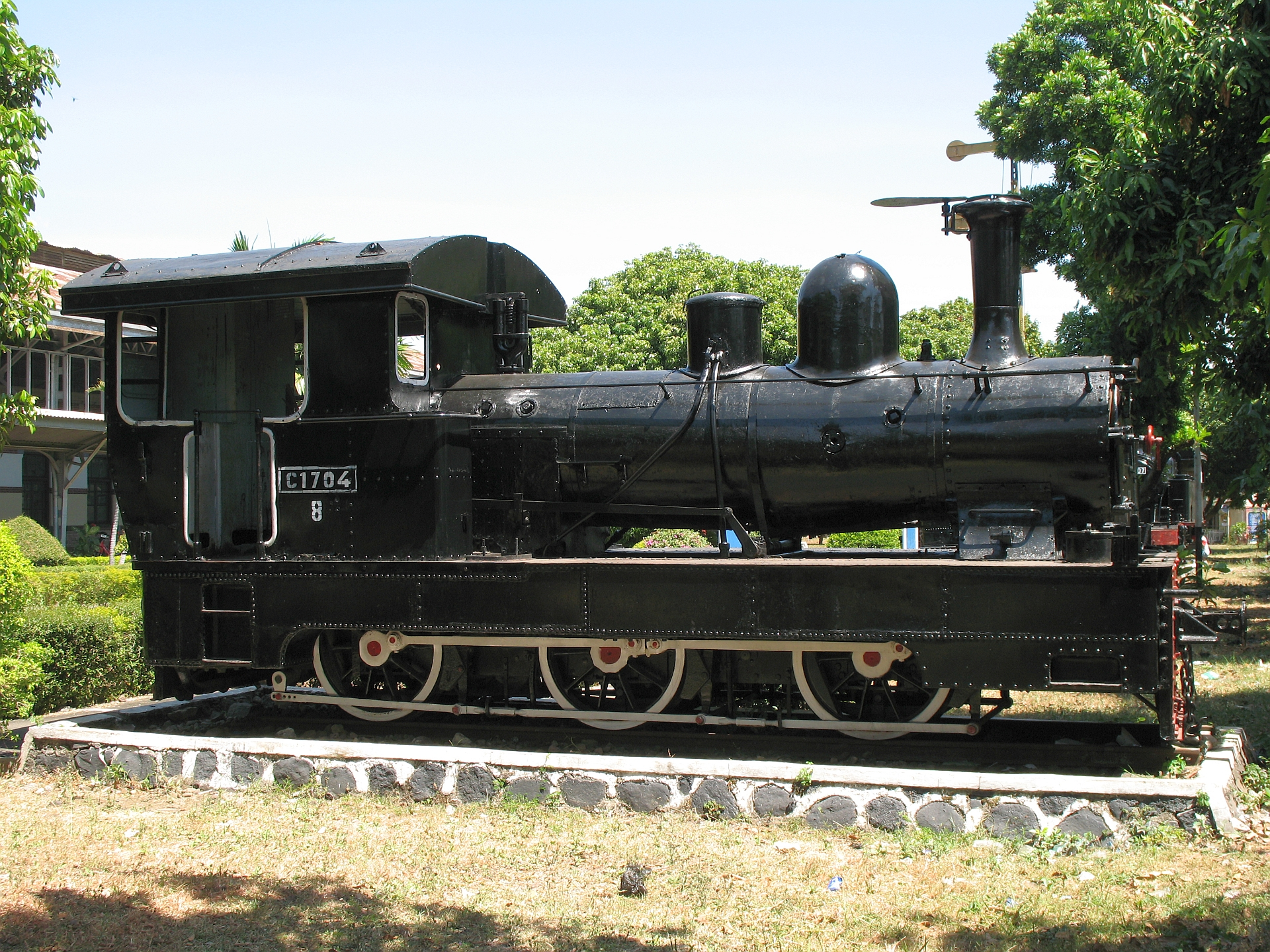 DKA C17 (C 17 04 A)